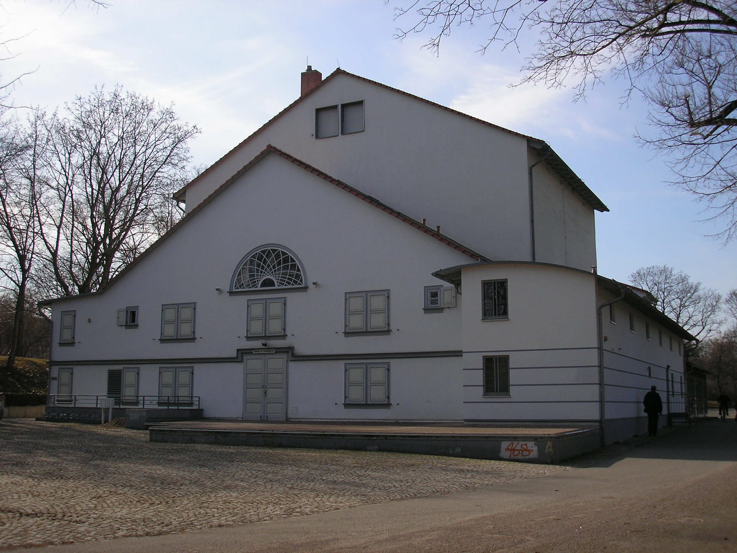 Das Theater in Arnstadt (Thüringen).